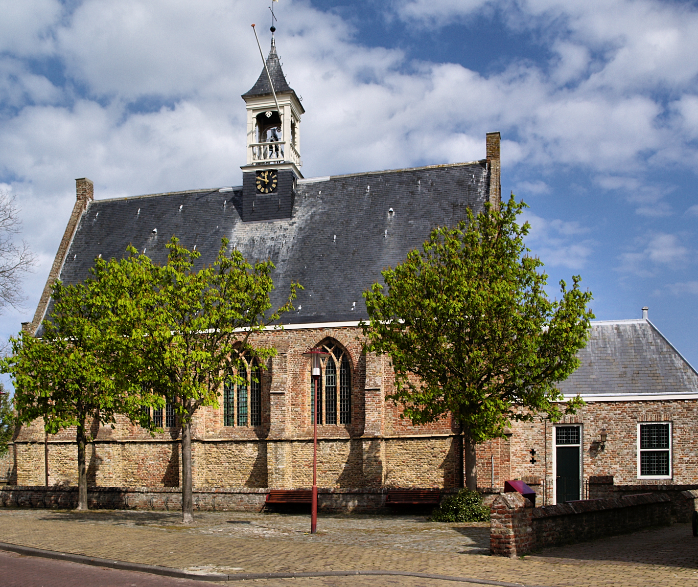 kerk in Vrouwenpolder Zeeland